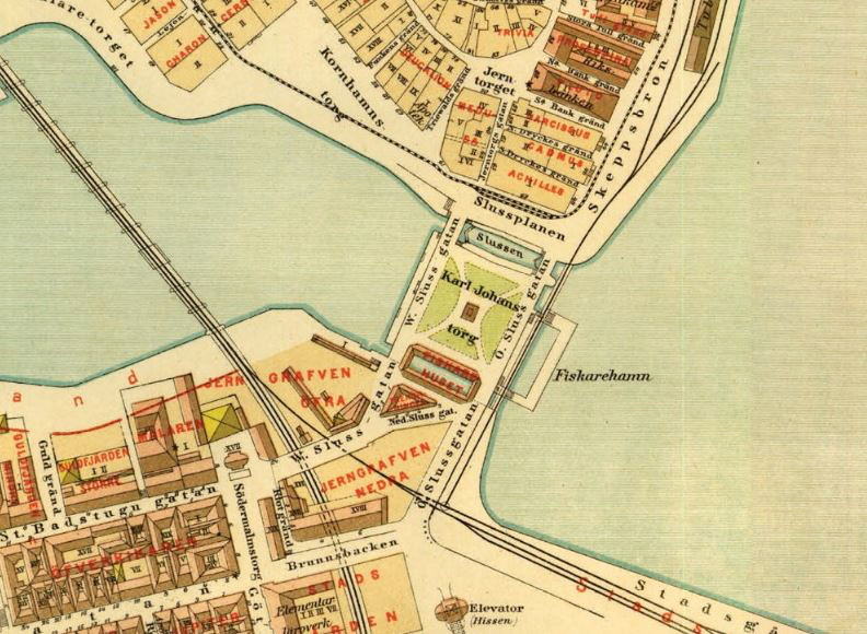 Del av Alfred Rudolf Lundgrens Stockholms karta visande Slussenområdet 1885